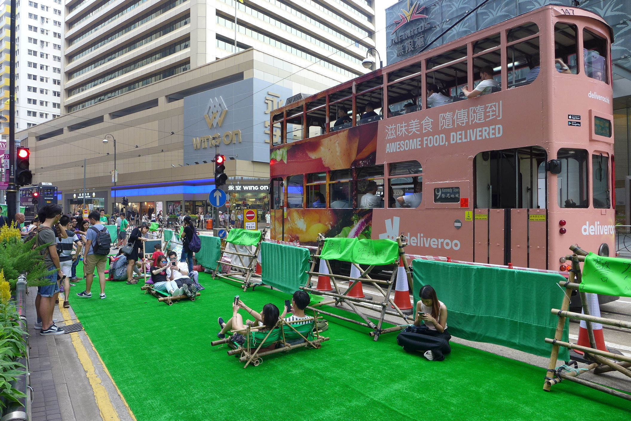 Very DVRC green lawn